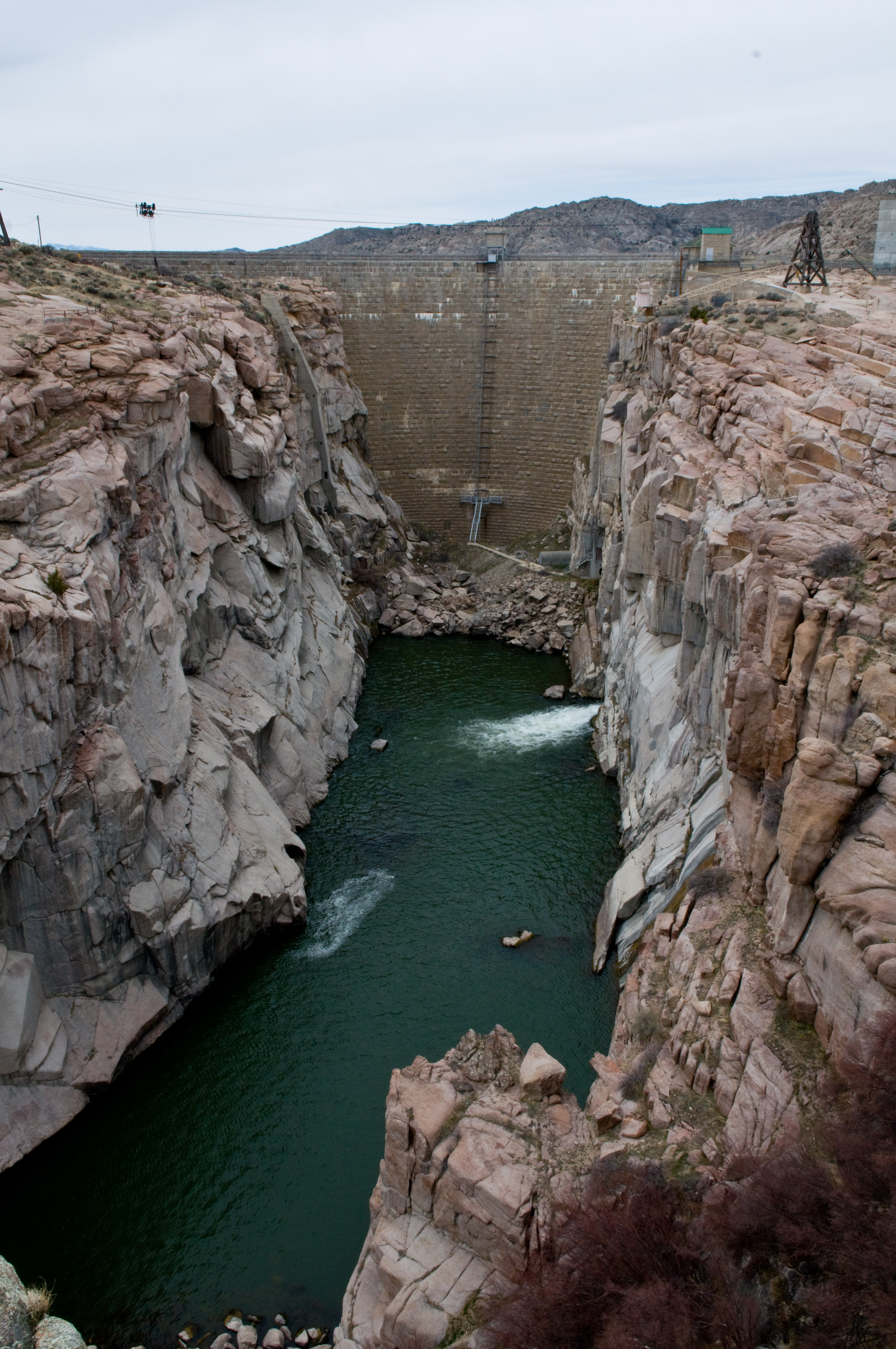 Pathfinder Dam in Wyoming